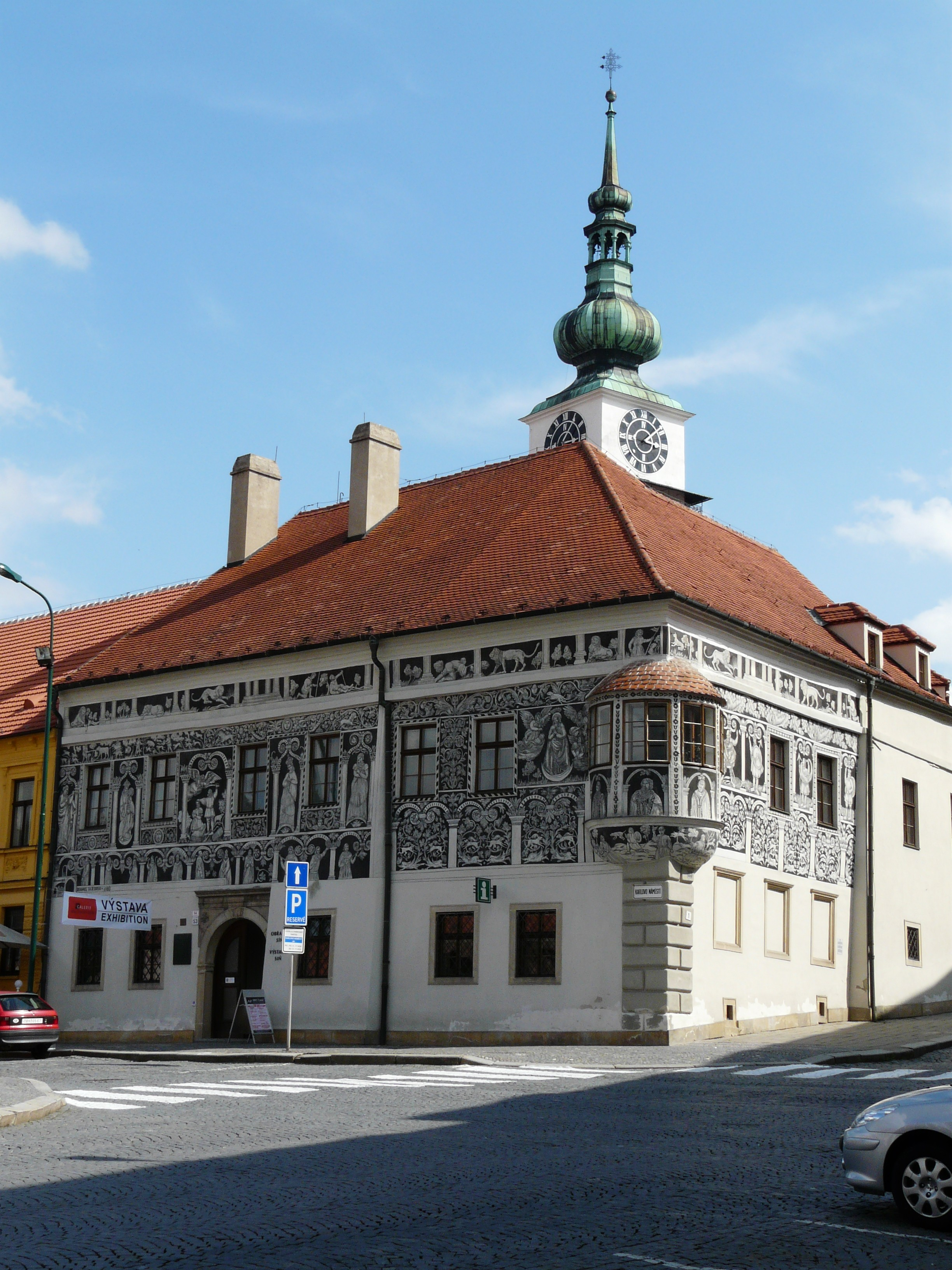 Malovaný dům v Třebíči